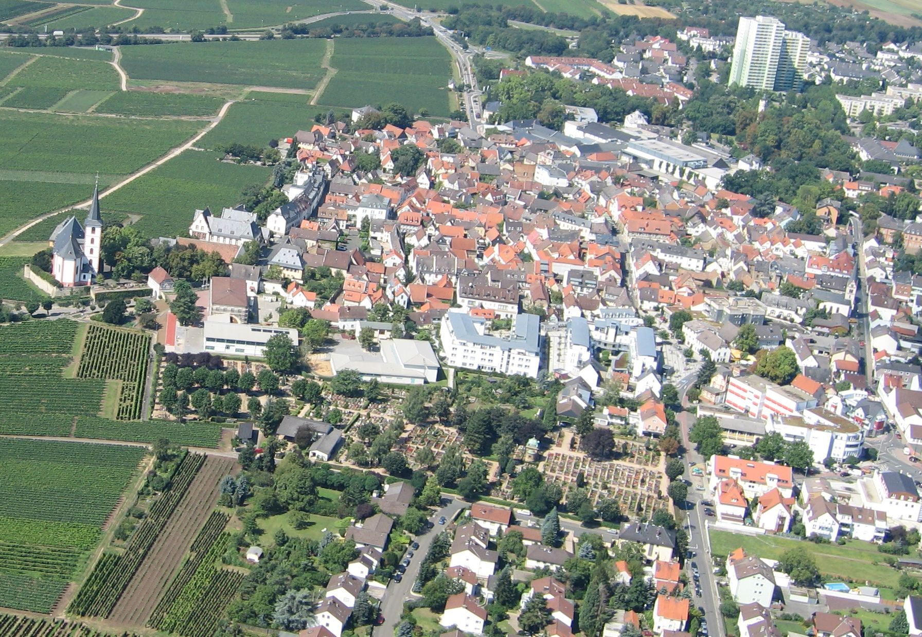 Foto der Altstadt von Hochheim am Main aufgenommen vom Gleitschirm aus am 13.Aug.2005.